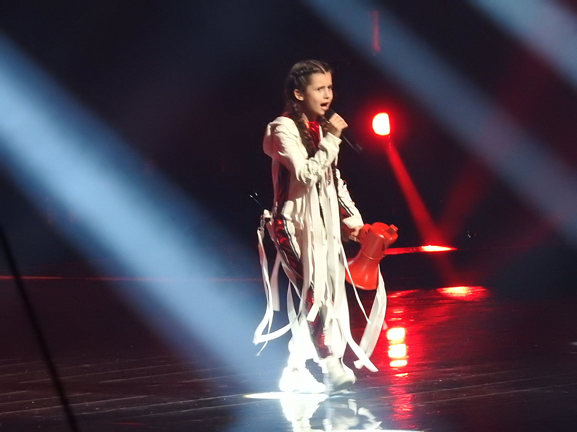 Ukraińska piosenkarka Darina Krasnowecka podczas prób do występu w 16. Konkursie Piosenki Eurowizji dla Dzieci w Mińsku, 24 listopada 2018.